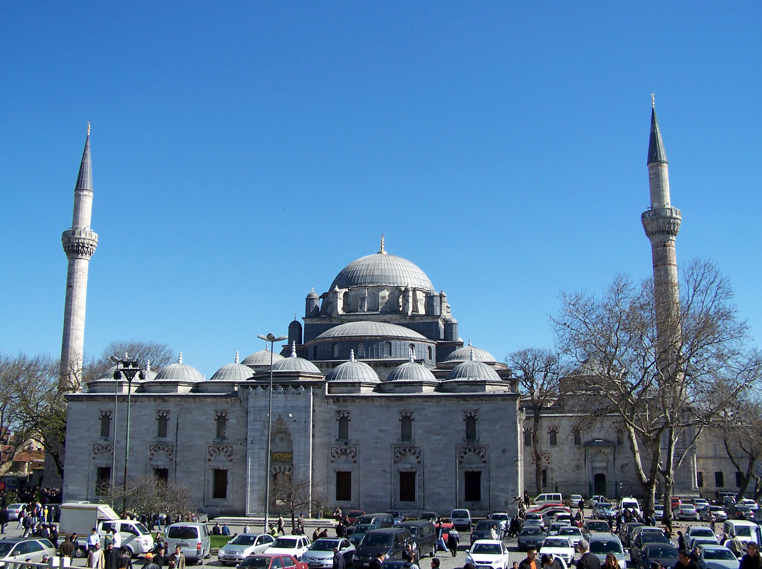 Sultan II. Beyazıt Camii in Fatih, İstanbul, Turkey